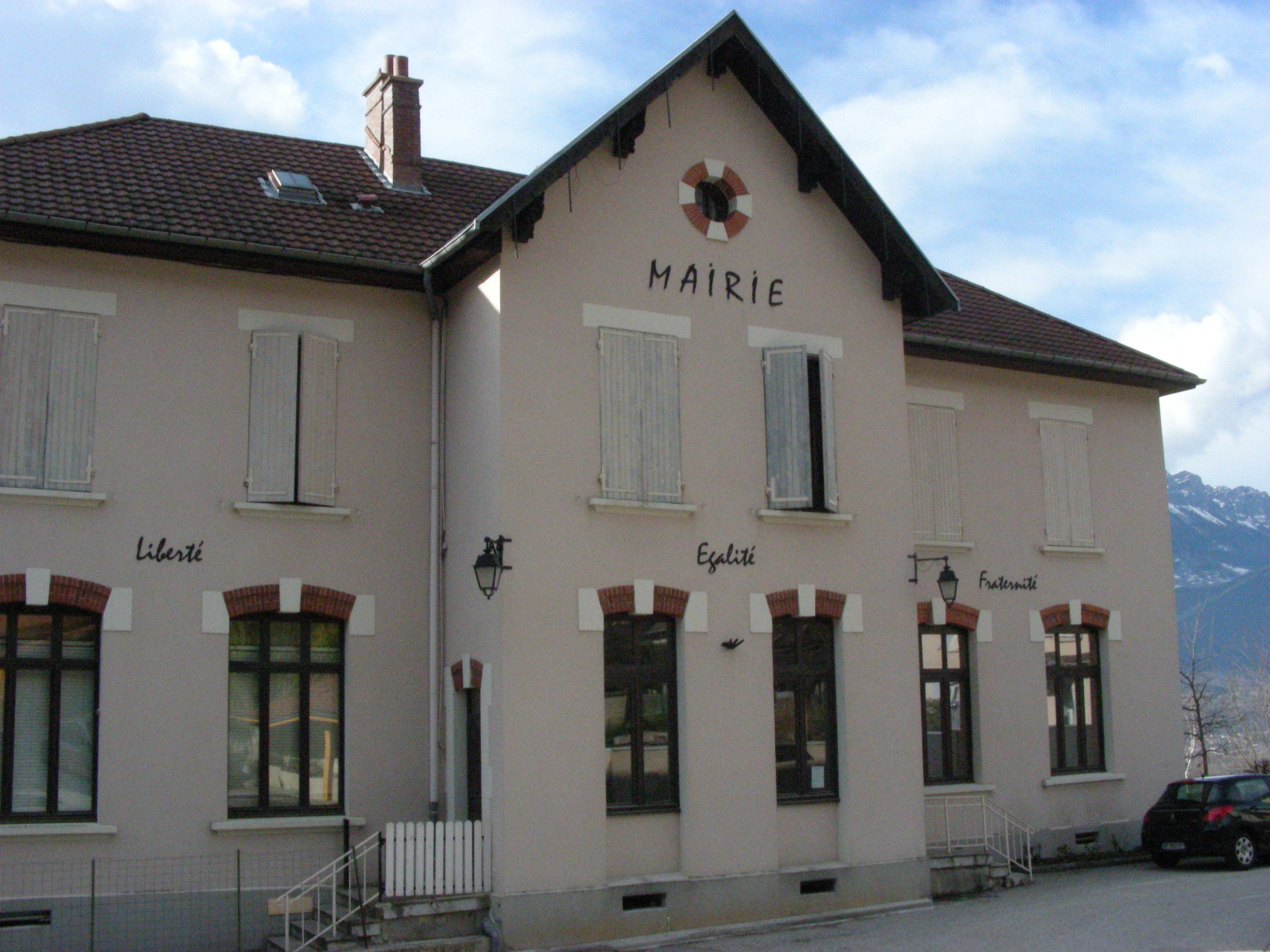 Marie du Champ-près-Froges